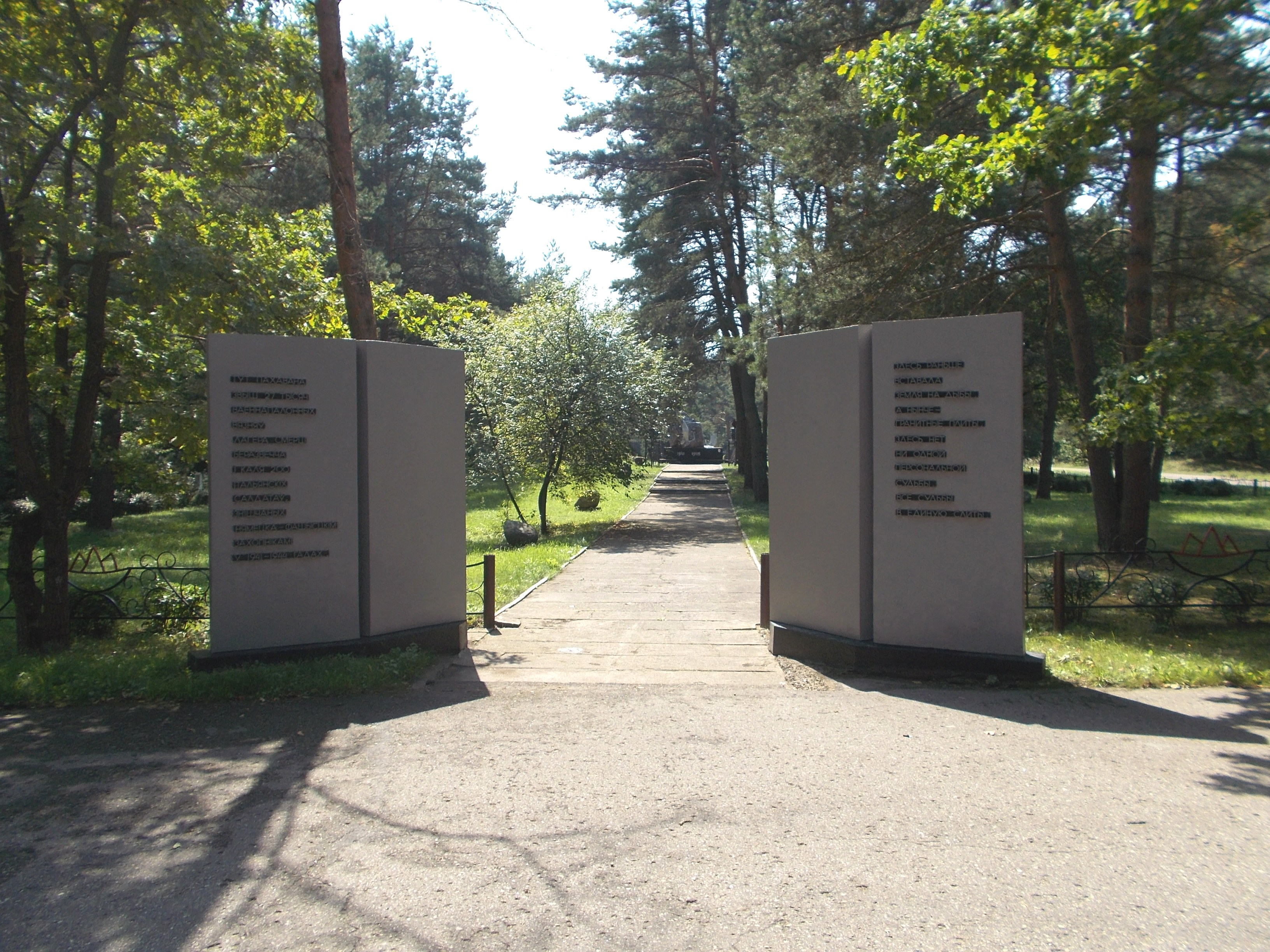 Мемориальный комплекс на месте захоронения жертв лагеря смерти.